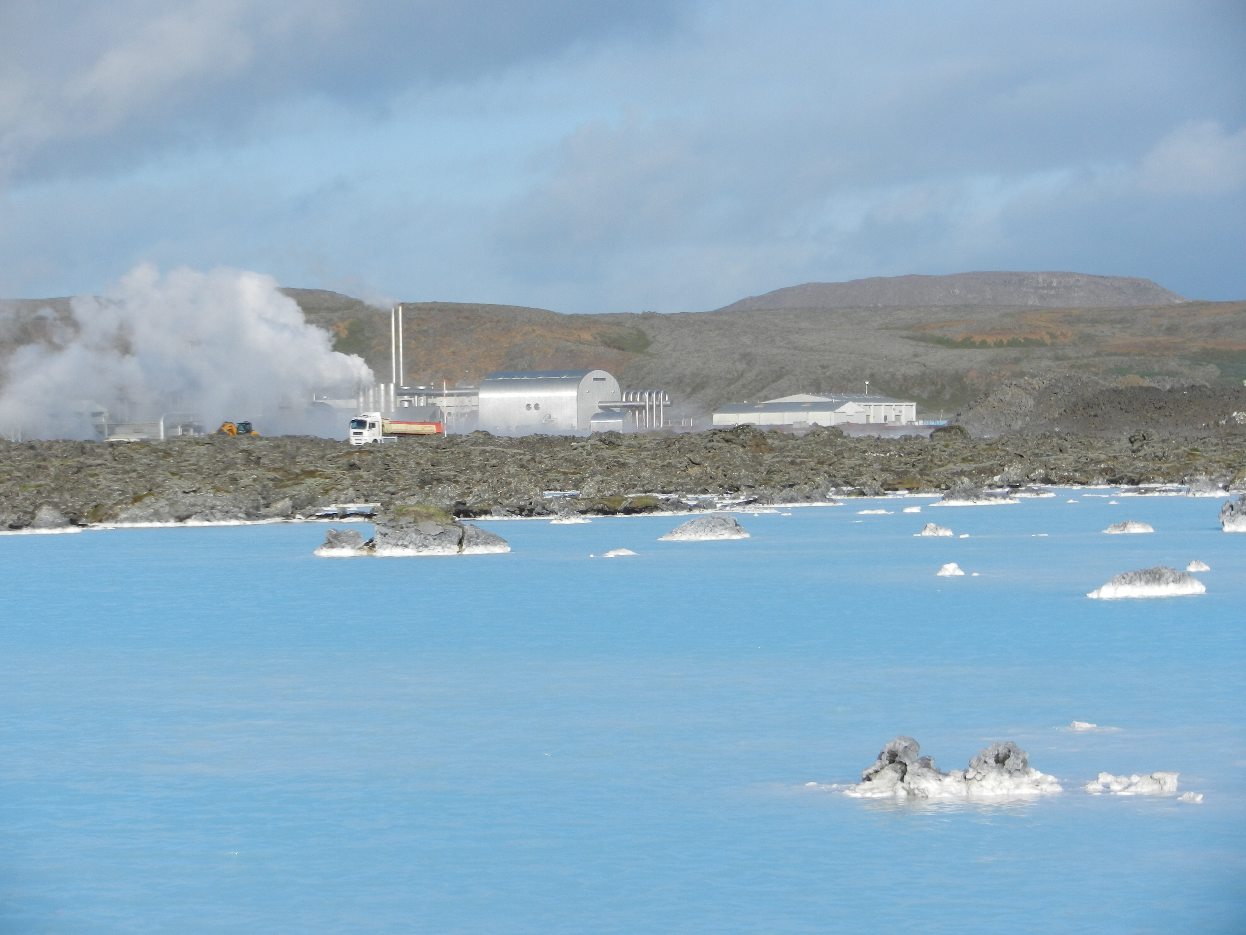 Modra laguna, polotok Reykjanes, v ozadju getermalna elektrarna, Islandija.